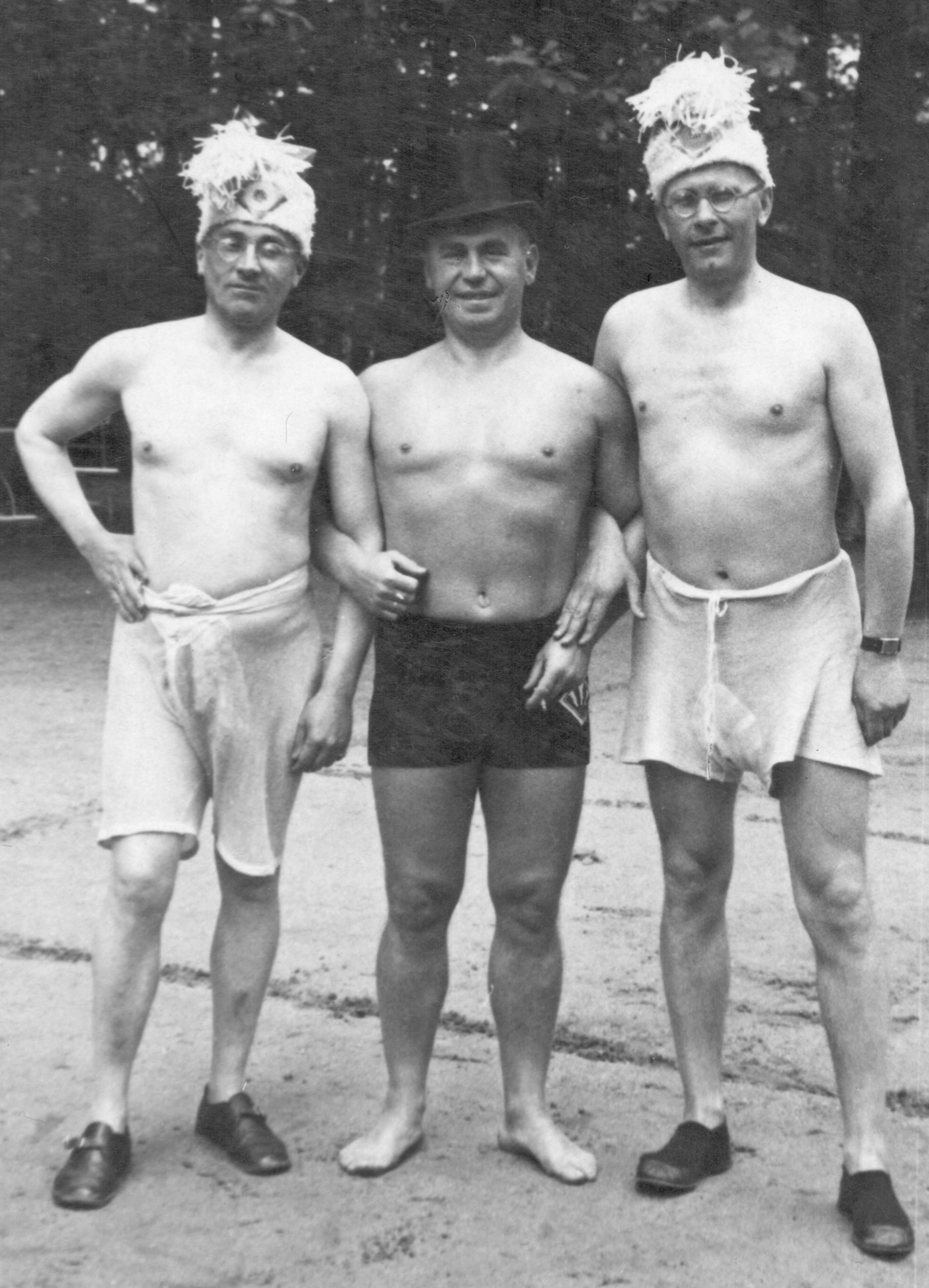 Roman Żurowski (z lewej) z szwagrem Ludwikiem Horochem w zakładzie przyrodoleczniczym dr Lahmana pod Dreznem.